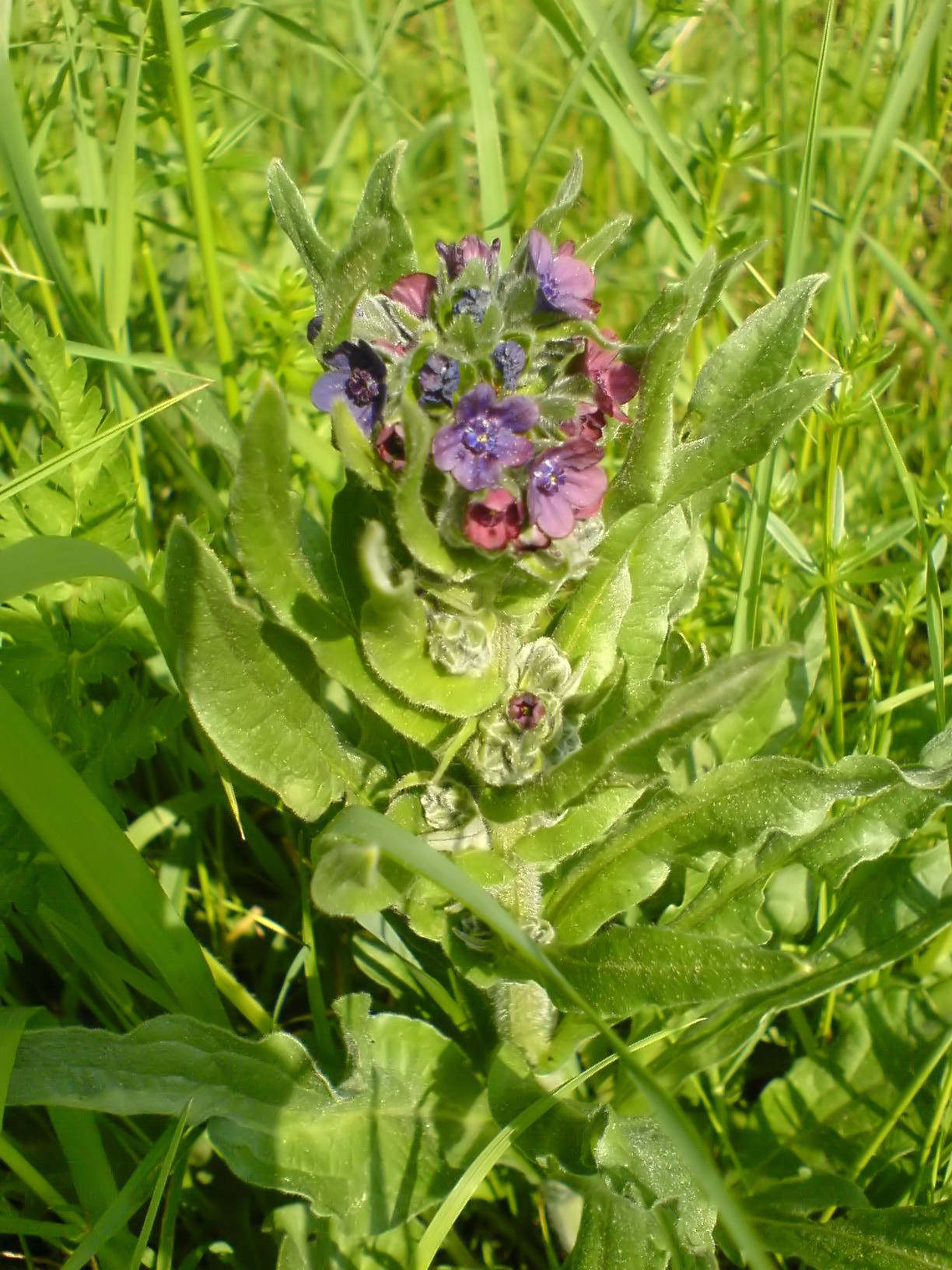 Hundszunge (Cynoglossum officinale) auf einer feuchten Wiese in Mitteldeutschland, ca. 30cm groß